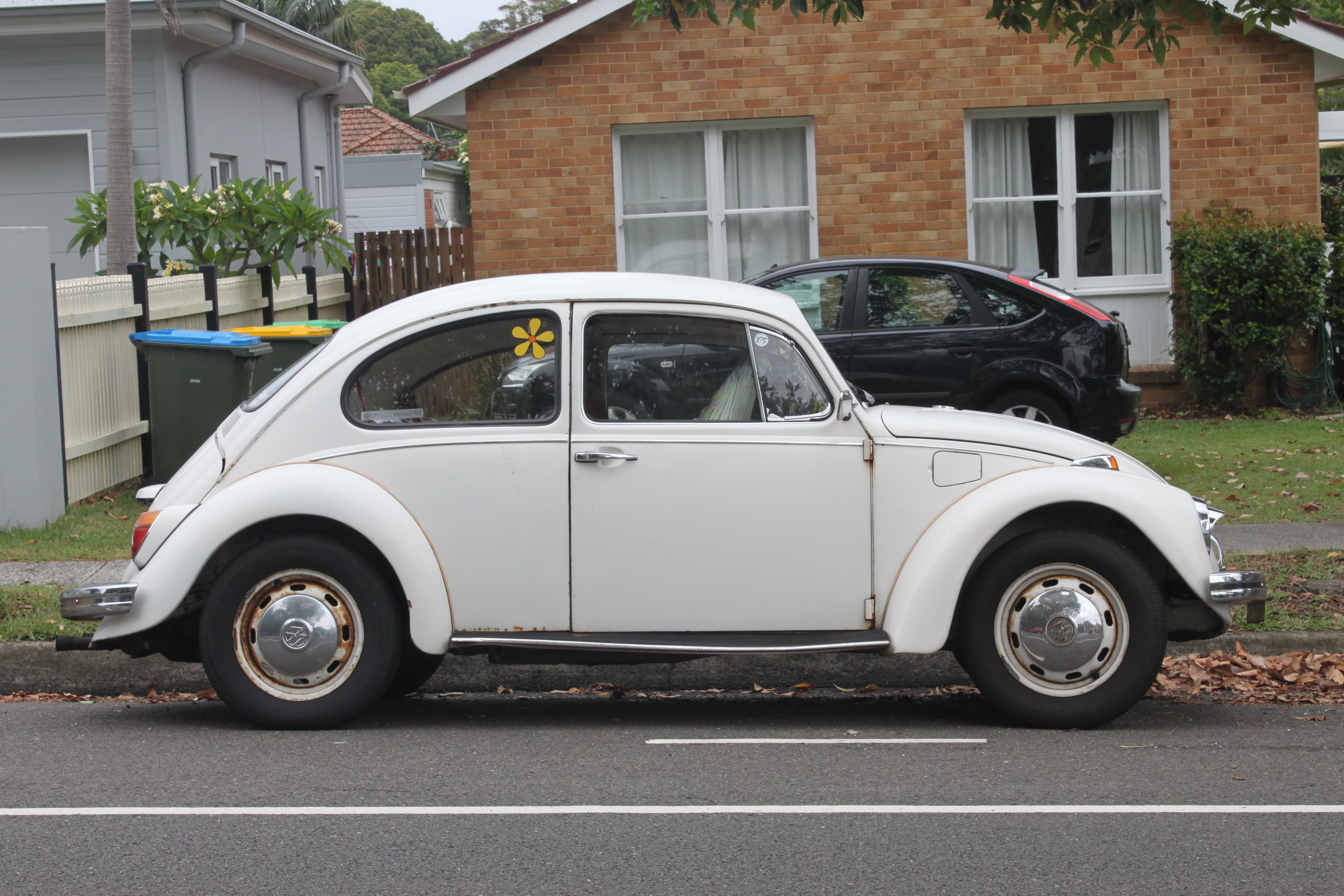 Volkswagen Type 1 1500